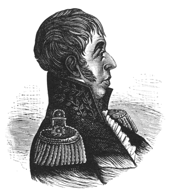 Dessin et gravure d'Alberto Urdaneta et d'Antonio Rodríguez, paru dans le périodique colombien "Papel Periódico Ilustrado" (1881-1887).